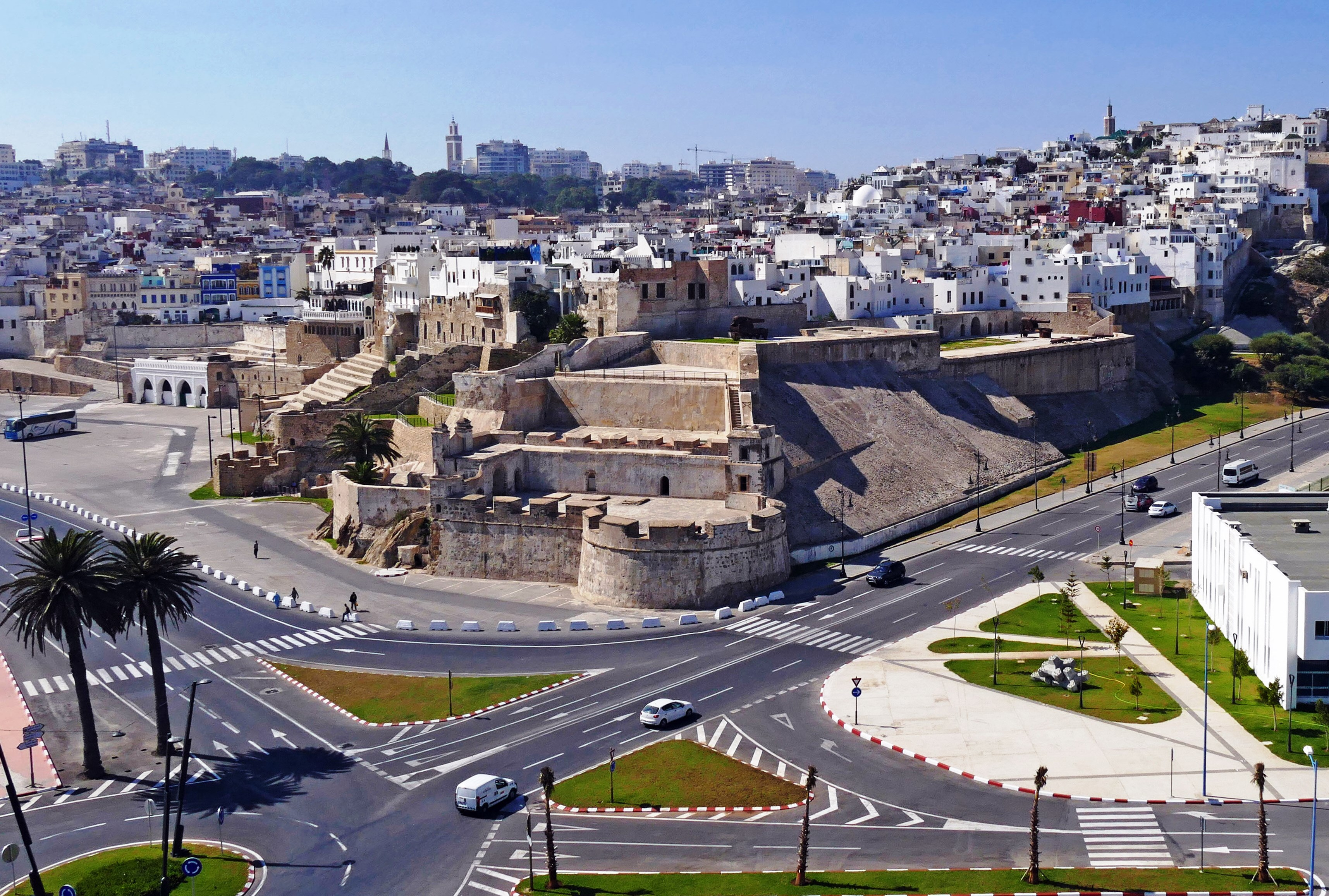 Prise de vue d'une partie de la muraille donnat dans la zone portuaire de Tanger Ville